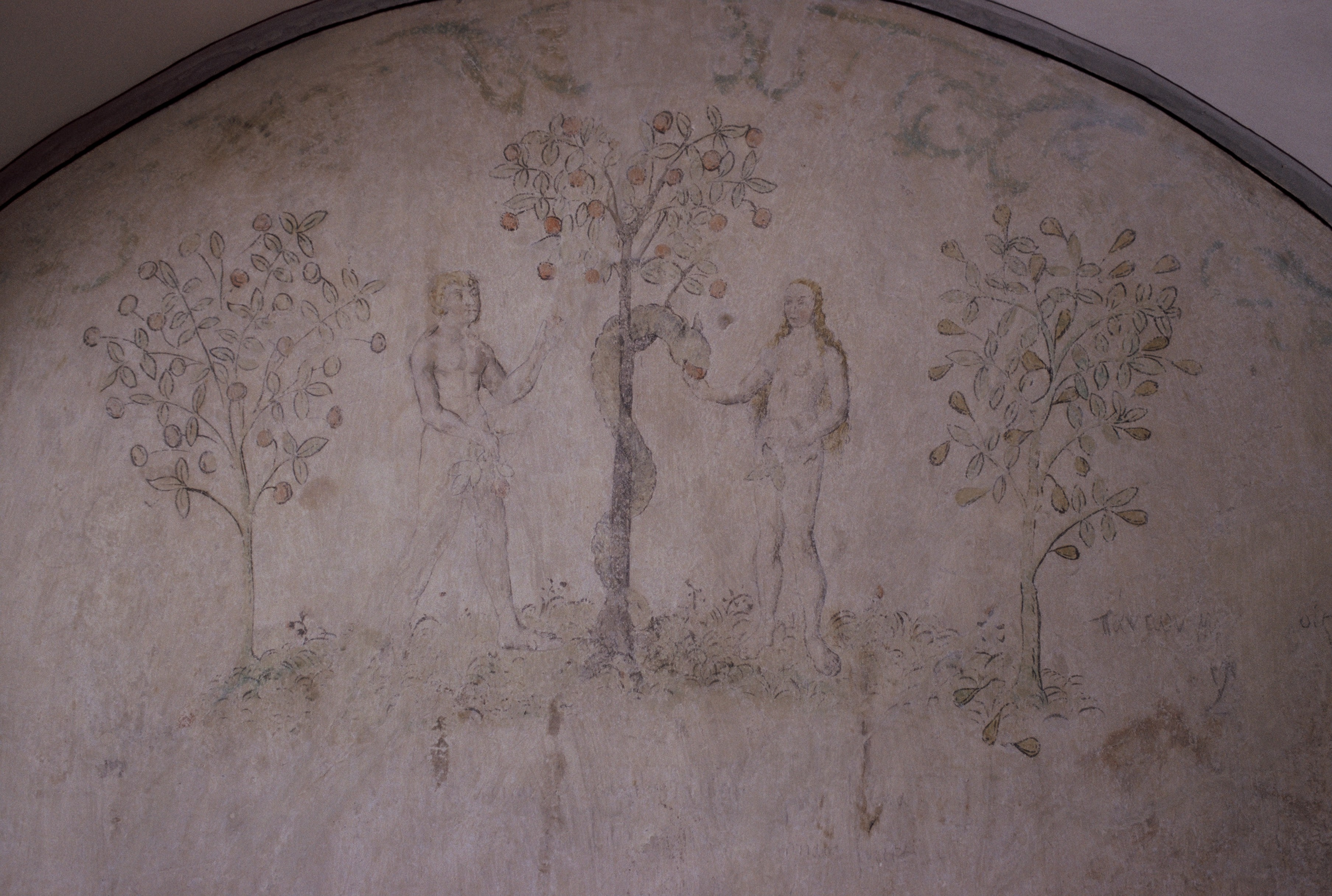 Adam und Eva unter dem Baum der Erkenntnistitle QS:P1476,de:"Adam und Eva unter dem Baum der Erkenntnis" label QS:Lde,"Adam und Eva unter dem Baum der Erkenntnis"